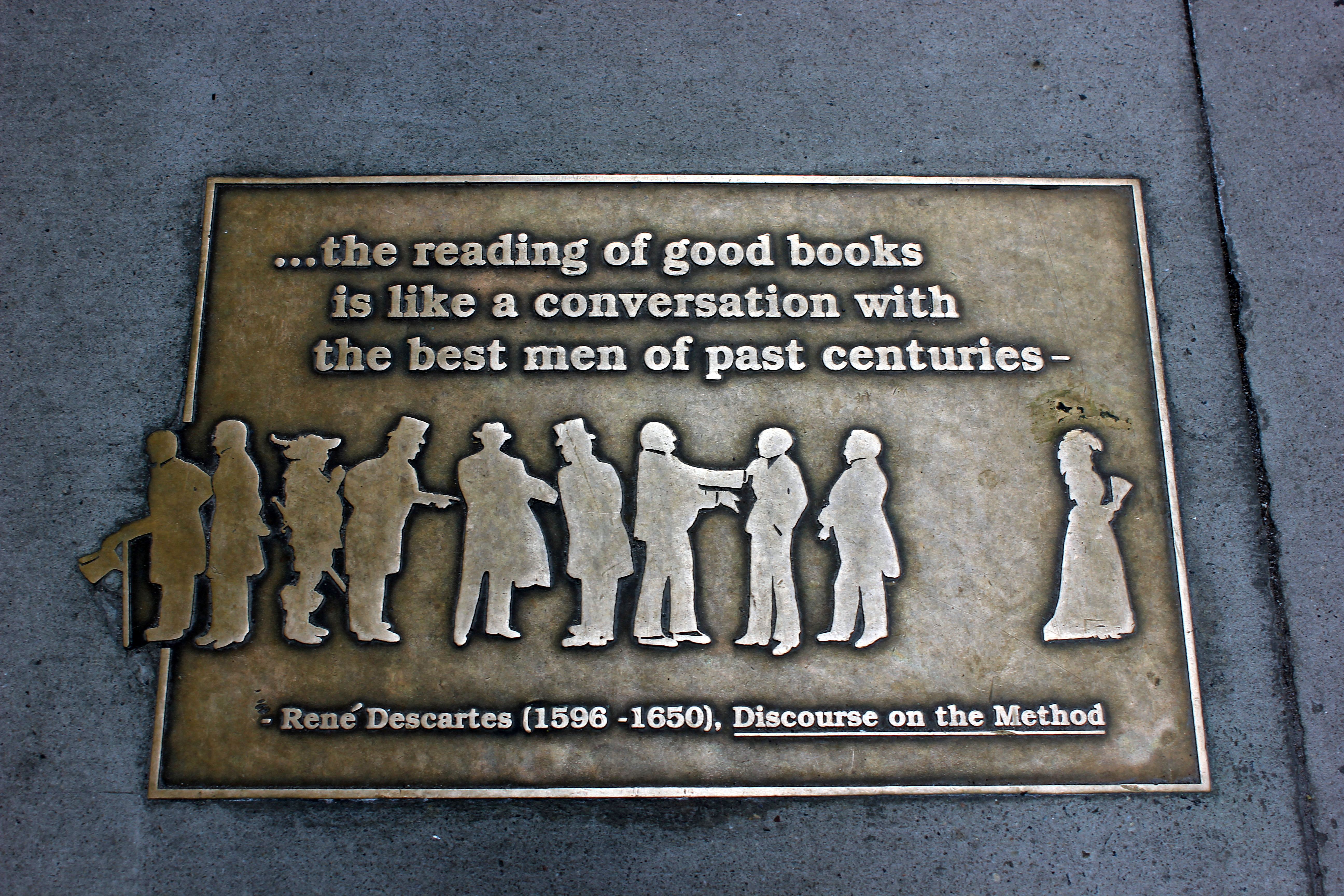 Library Walk New York City